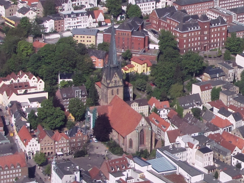 Luftbild der St. Nikolai-Kirche (Kulturdenkmal) am Südermarkt bzw. Nikolaikirchhof 8 in Flensburg, Schleswig-Holstein Foto Wolfgang Pehlemann Steinberg/Ostsee IMG 6190